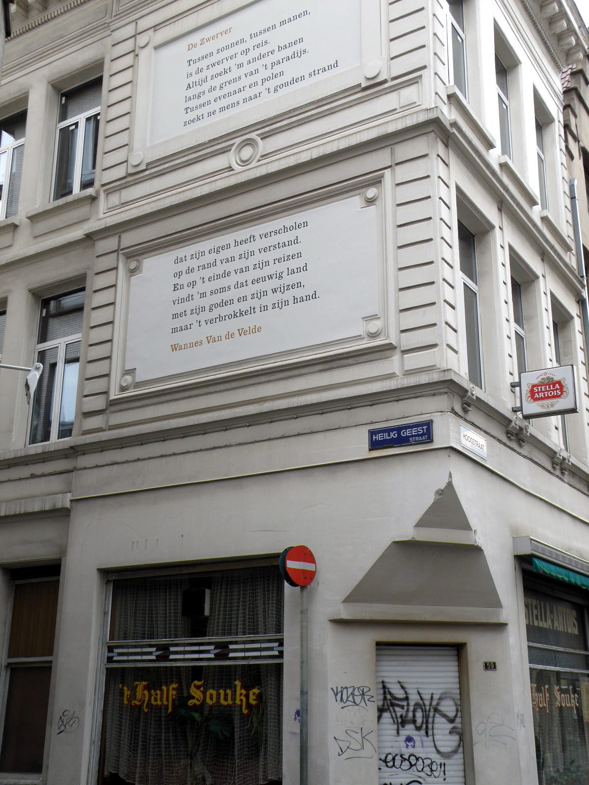 Antwerpen, hoek Hoogstraat/Heilig Geeststraat. Verzen van Wannes Van de Velde op gevel van kroeg "'tHalf Souke'".